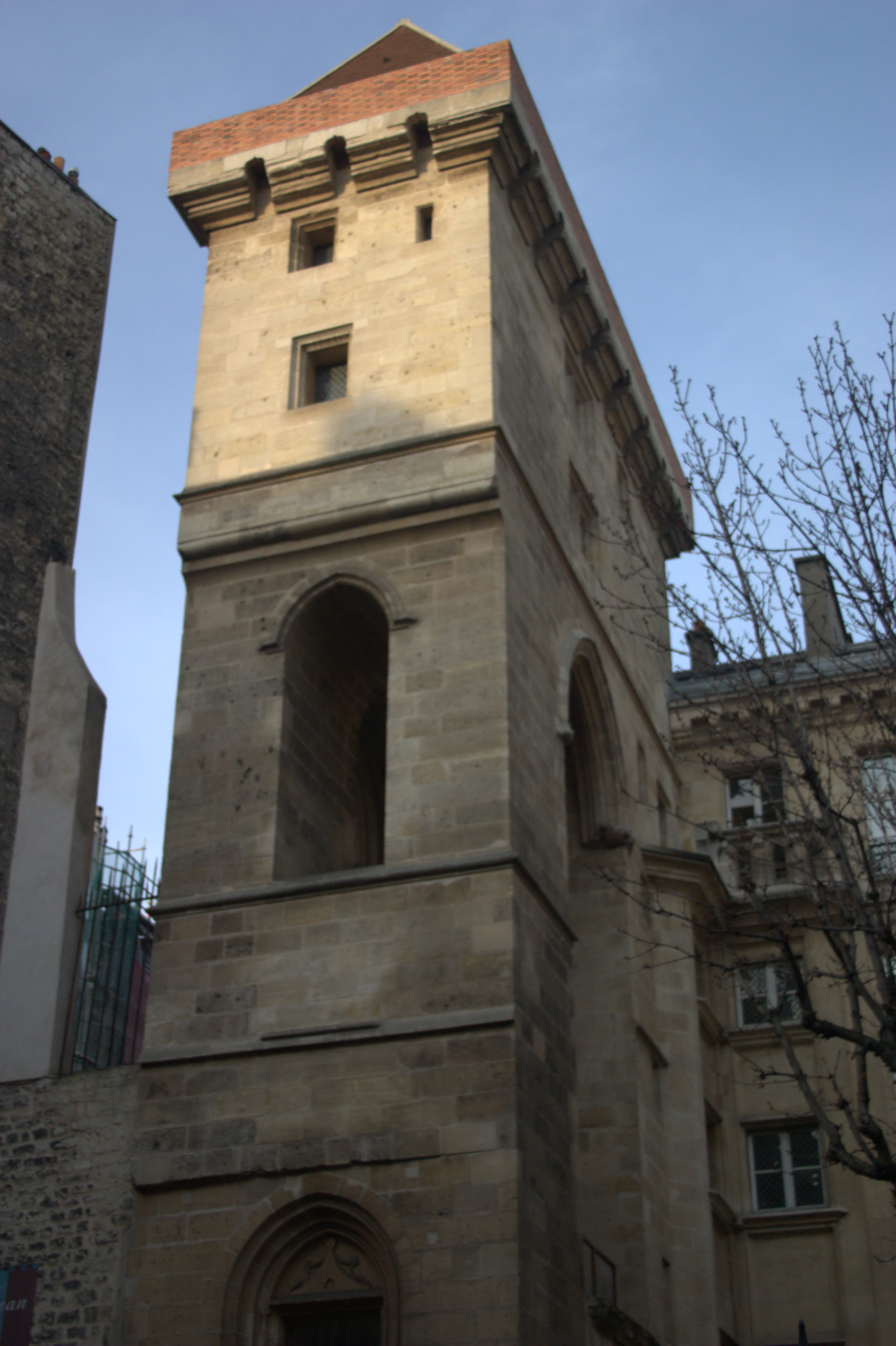 Tour Jean Sans Peur, dernier vestige subsistant de l'Hôtel de Bourgogne